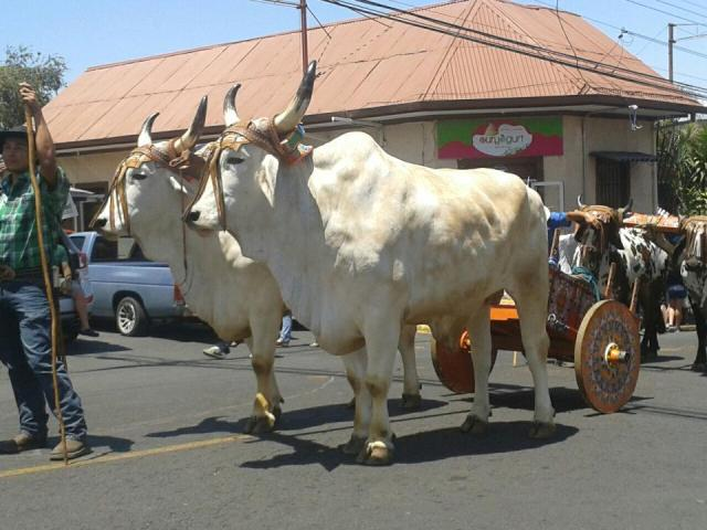 Celebración del día nacional del boyero costarricense 2013 en San Antonio de Escazú, Costa Rica.